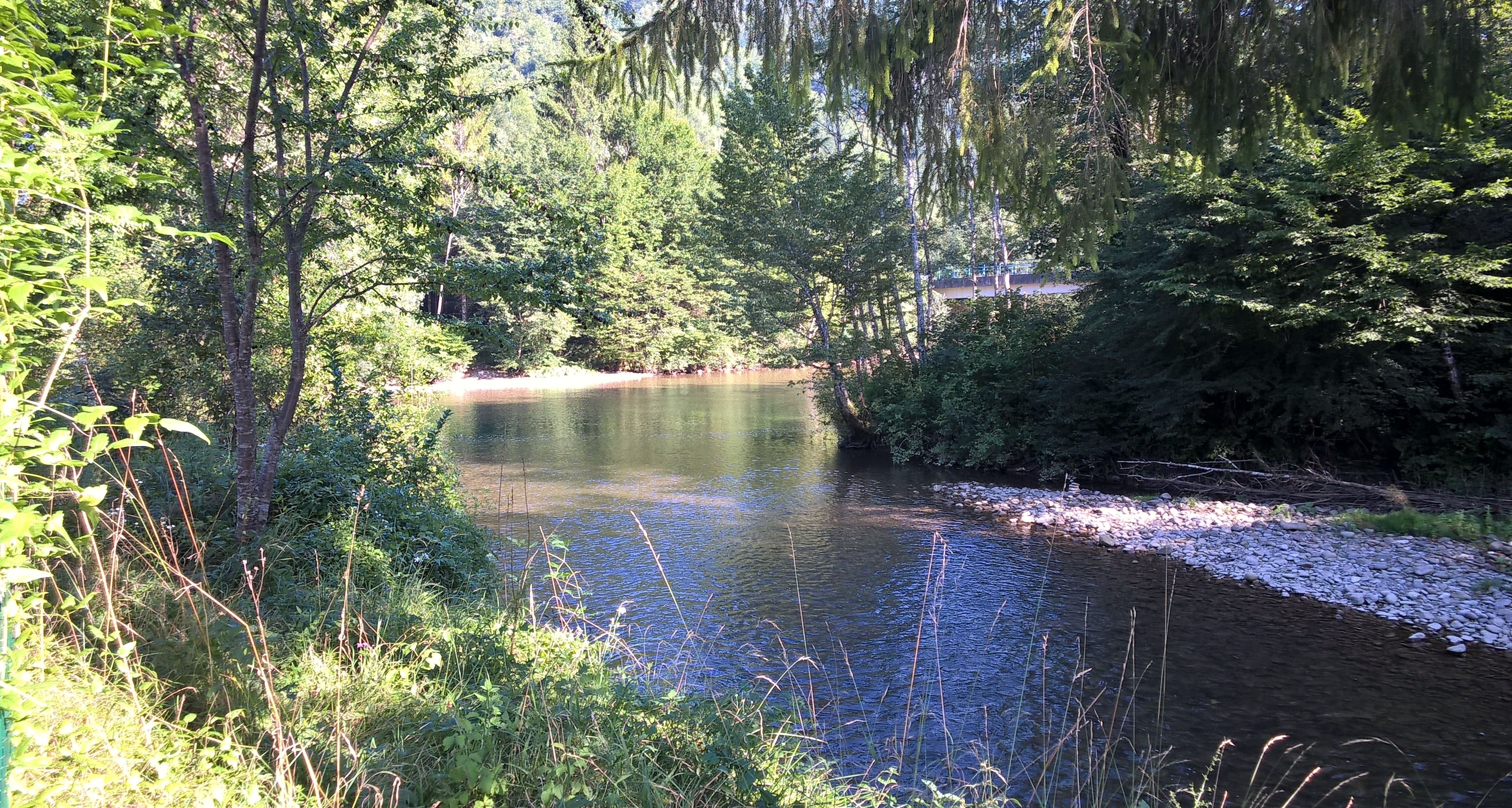 Izliv Čabranke v Kolpo pri kraju Osilnica